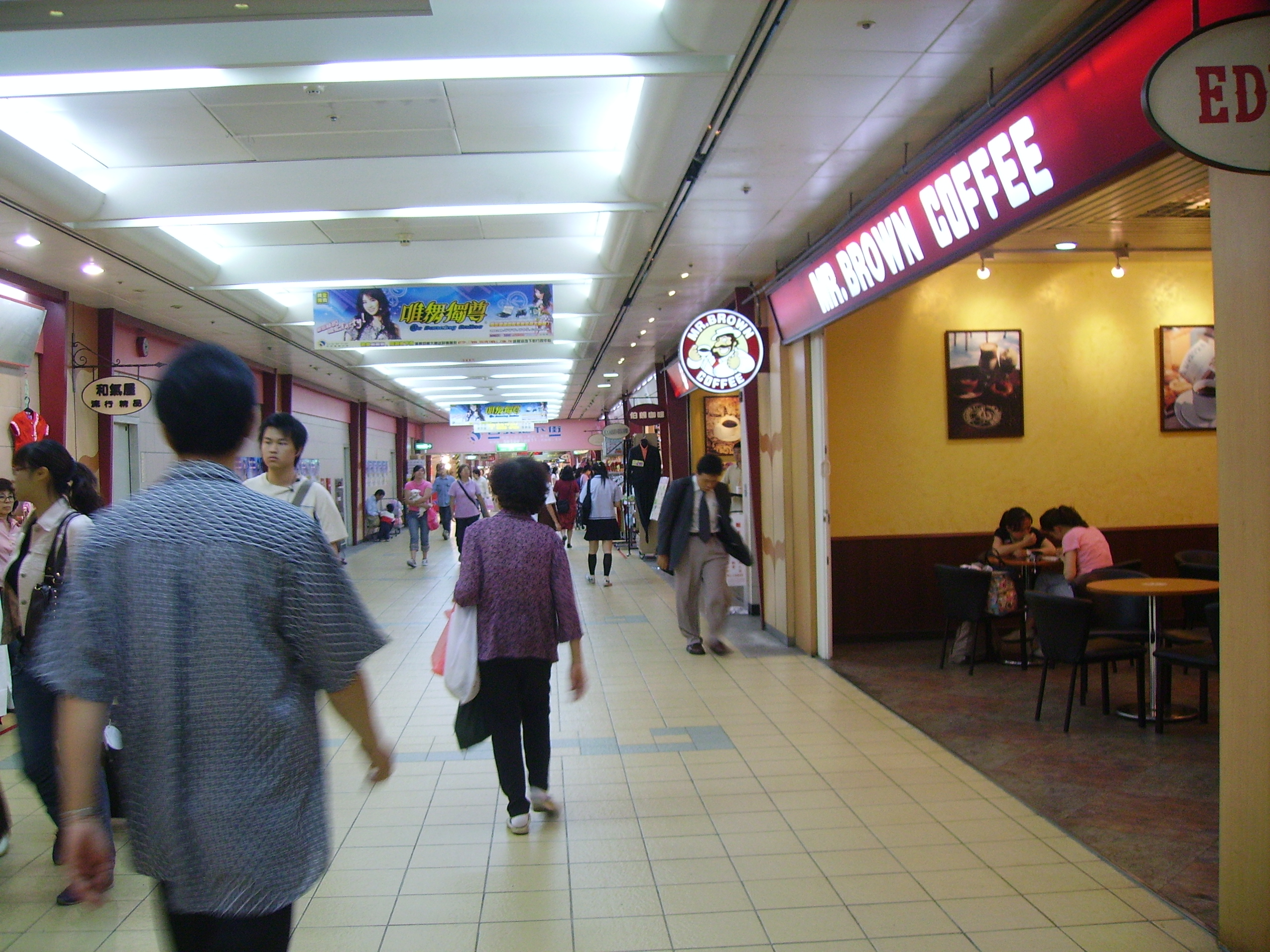 台北地下街，伯朗咖啡館市民店前。